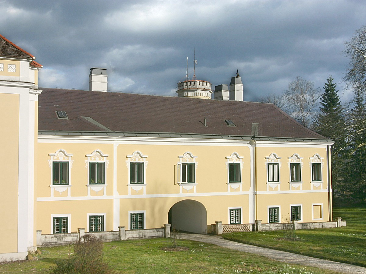 Schloss Linsberg in Erlach (Niederösterreich) Wohntrakt